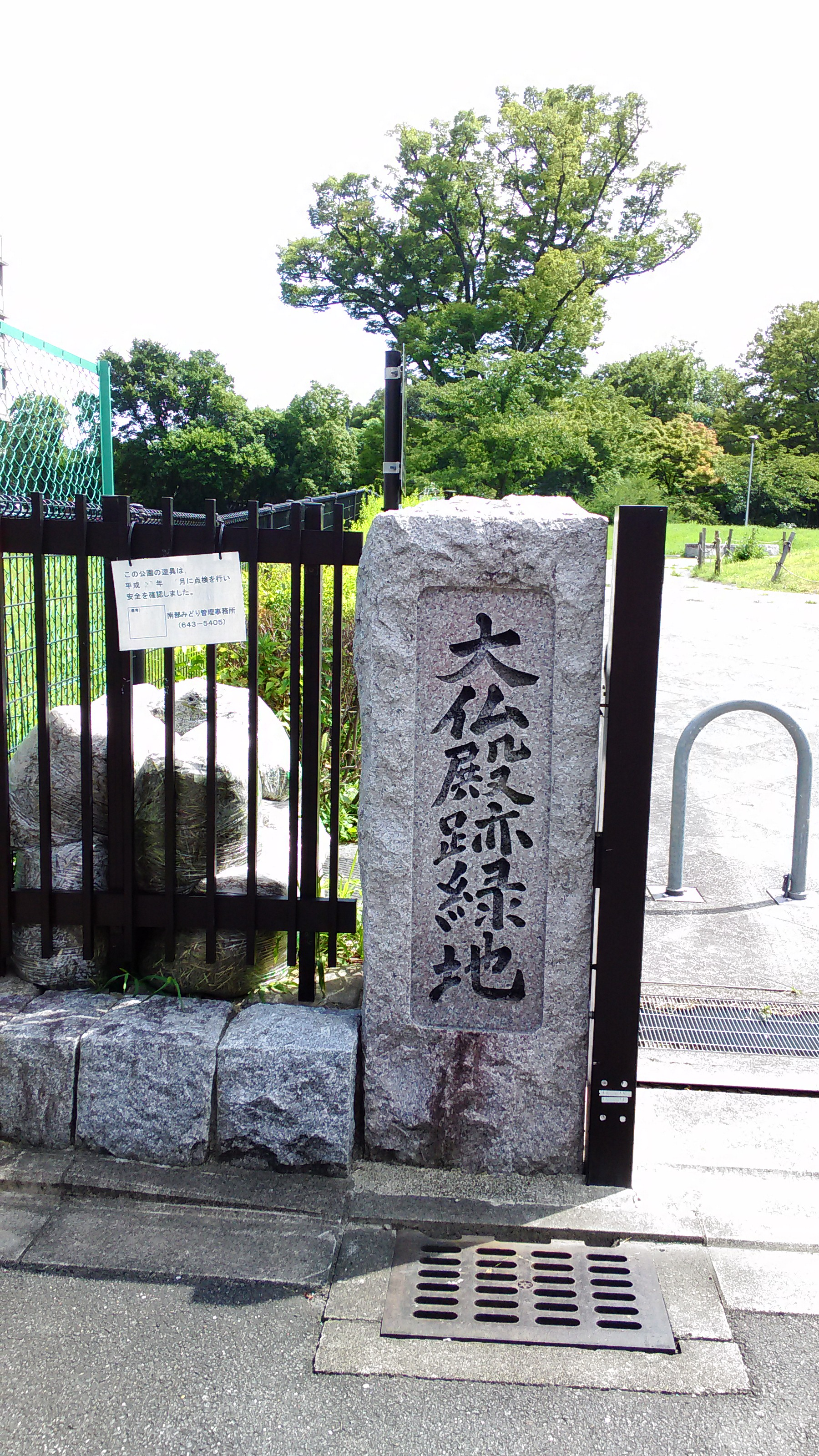 方広寺の大仏殿後の緑地の入り口